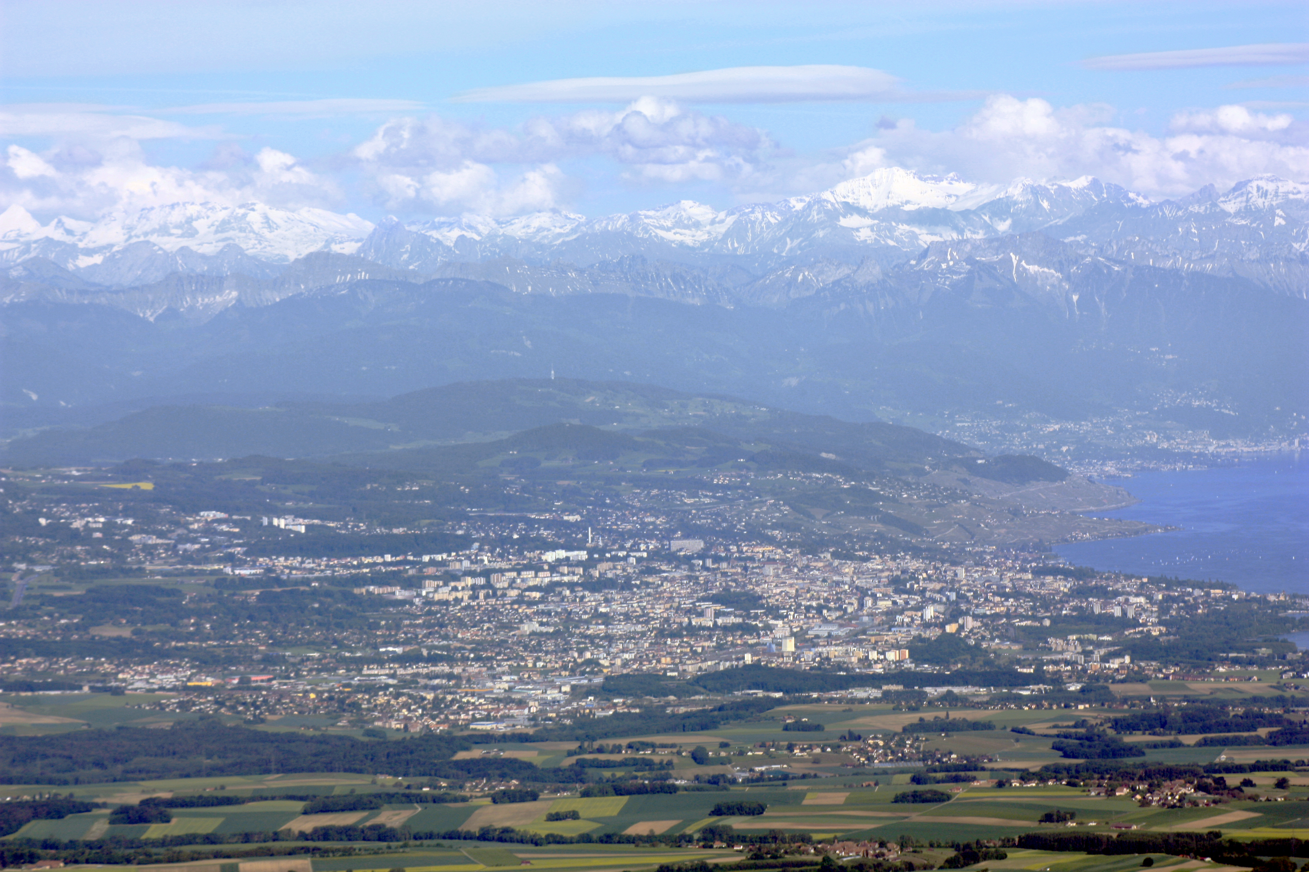 Vue sur Lausanne depuis le Mont Tendre